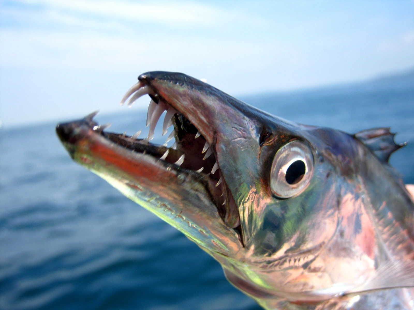 Largehead hairtail Trichiurus lepturus taken on August 23, 2009